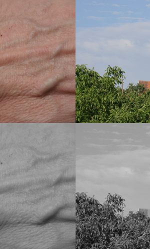 Umsetzung von Farben in ein Schwarz-Weiss-Bild, digital simuliert (Bildbearbeitung gimp, Filter color2bw). Nur roter und grüner Kanal, entspricht simulierten Gelbfilter.